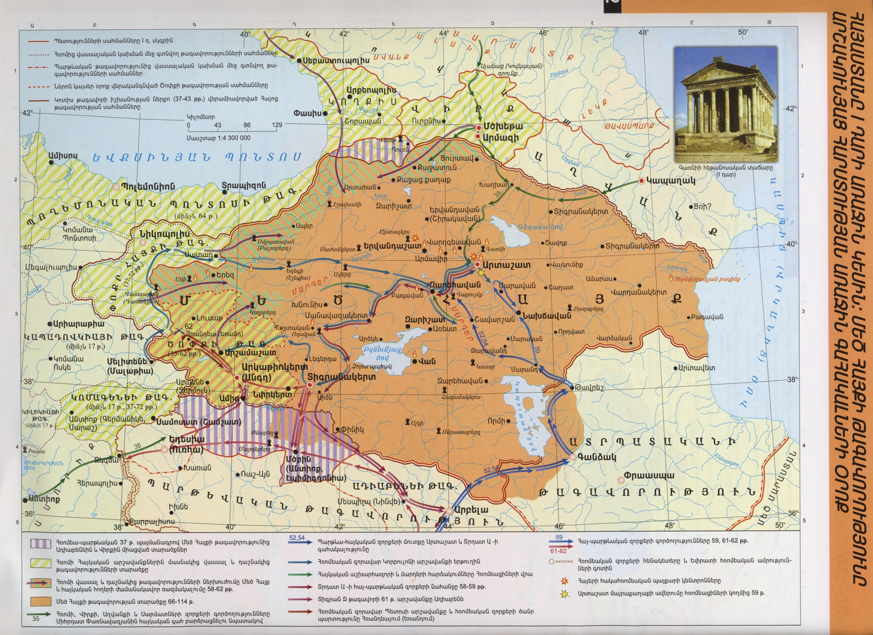 Մեծ Հայքի թագավորությունը I դարի I քառորդում Արշակունյաց հարստության առաջին գահակալների օրոք